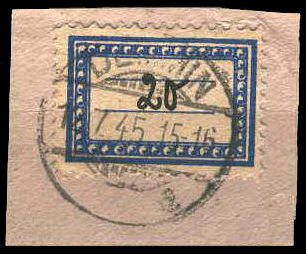 Провизорная марка Деммина, 1945 (Мекленбург-Передняя Померания)